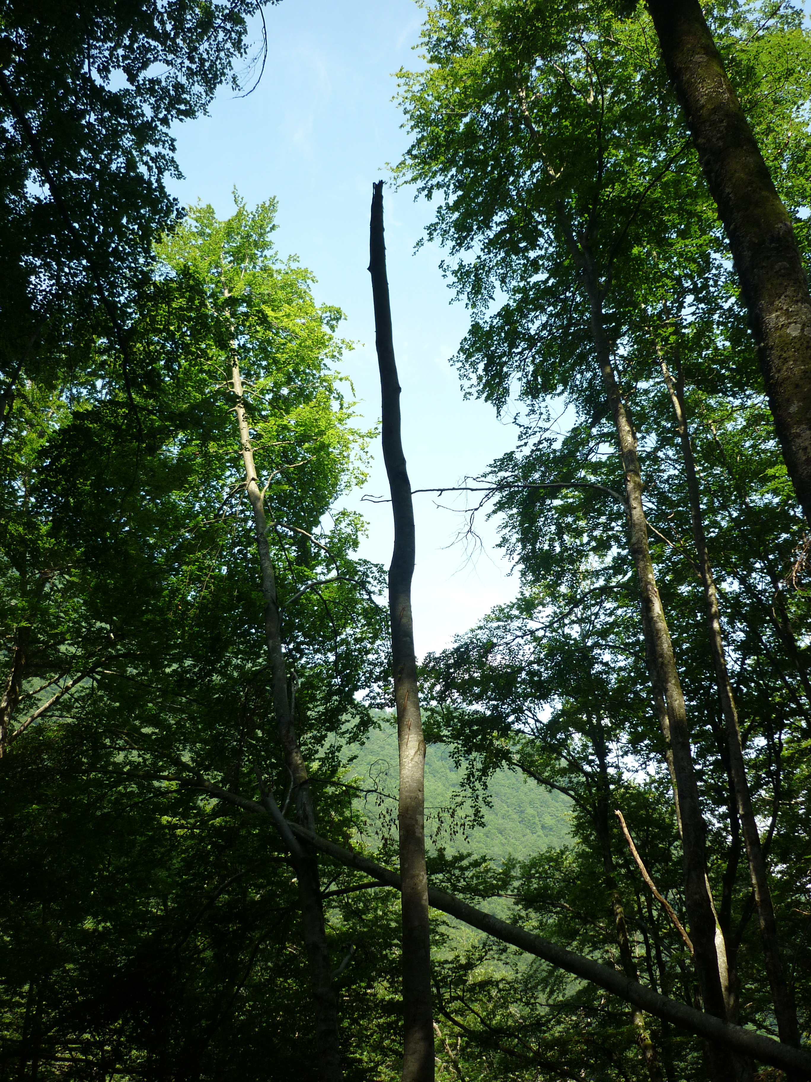 belle hêtraie de Bethmale, chablis cassé, photo depuis le GR 10